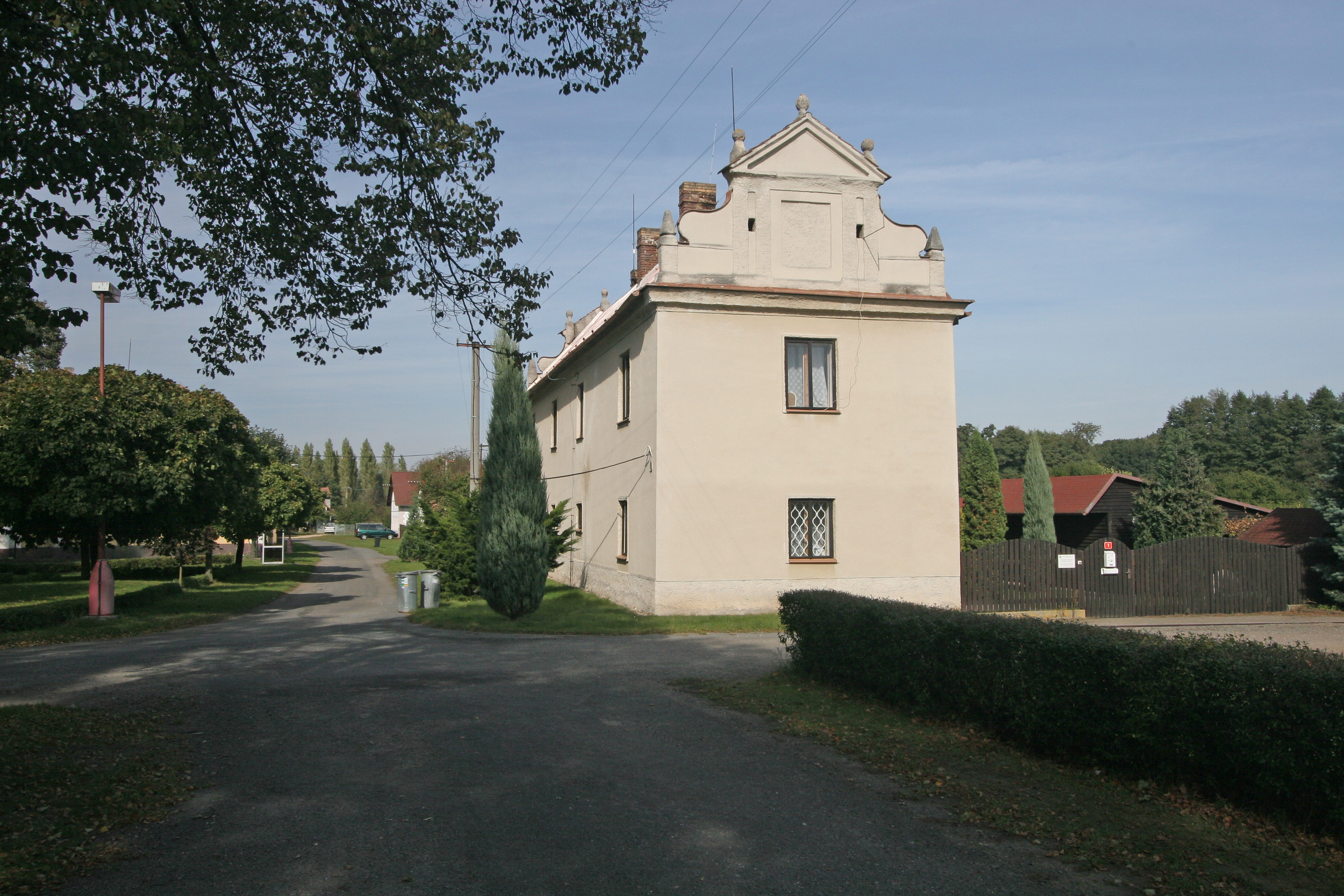 Litošice čp. 1